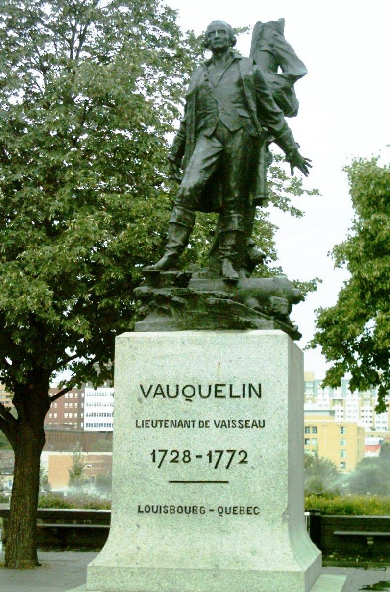 Vauquelin, lieutenant de vaisseau, sculpture d'Eugène Bénet érigée en 1930 près de l'Hôtel de Ville, face à la place Jacques-Cartier. Jean Vauquelin (1728-1772) est un héros de la marine française devenu commandant de la flotte dans le fleuve Saint-Laurent.